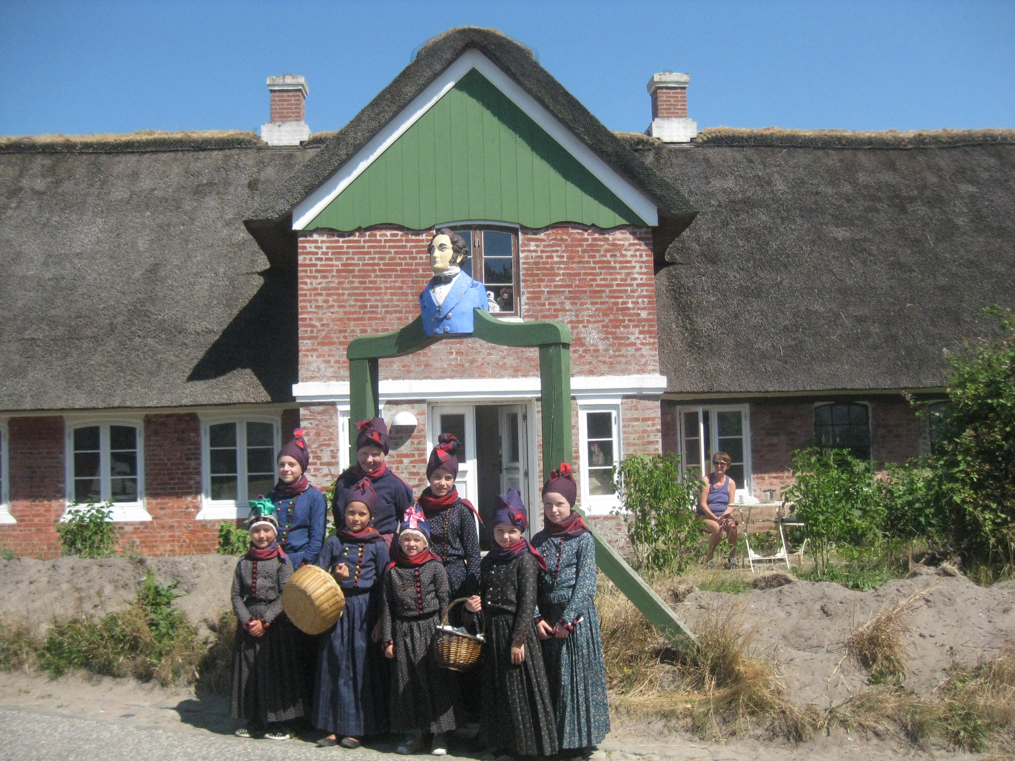 Galionsgården i Sønderho "Lord Palmerstone" 1847